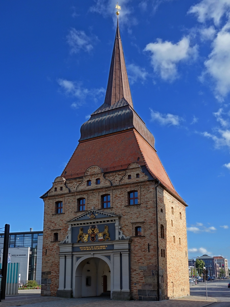 Stadtseite des Steintores in Rostock mit Renaissanceportal